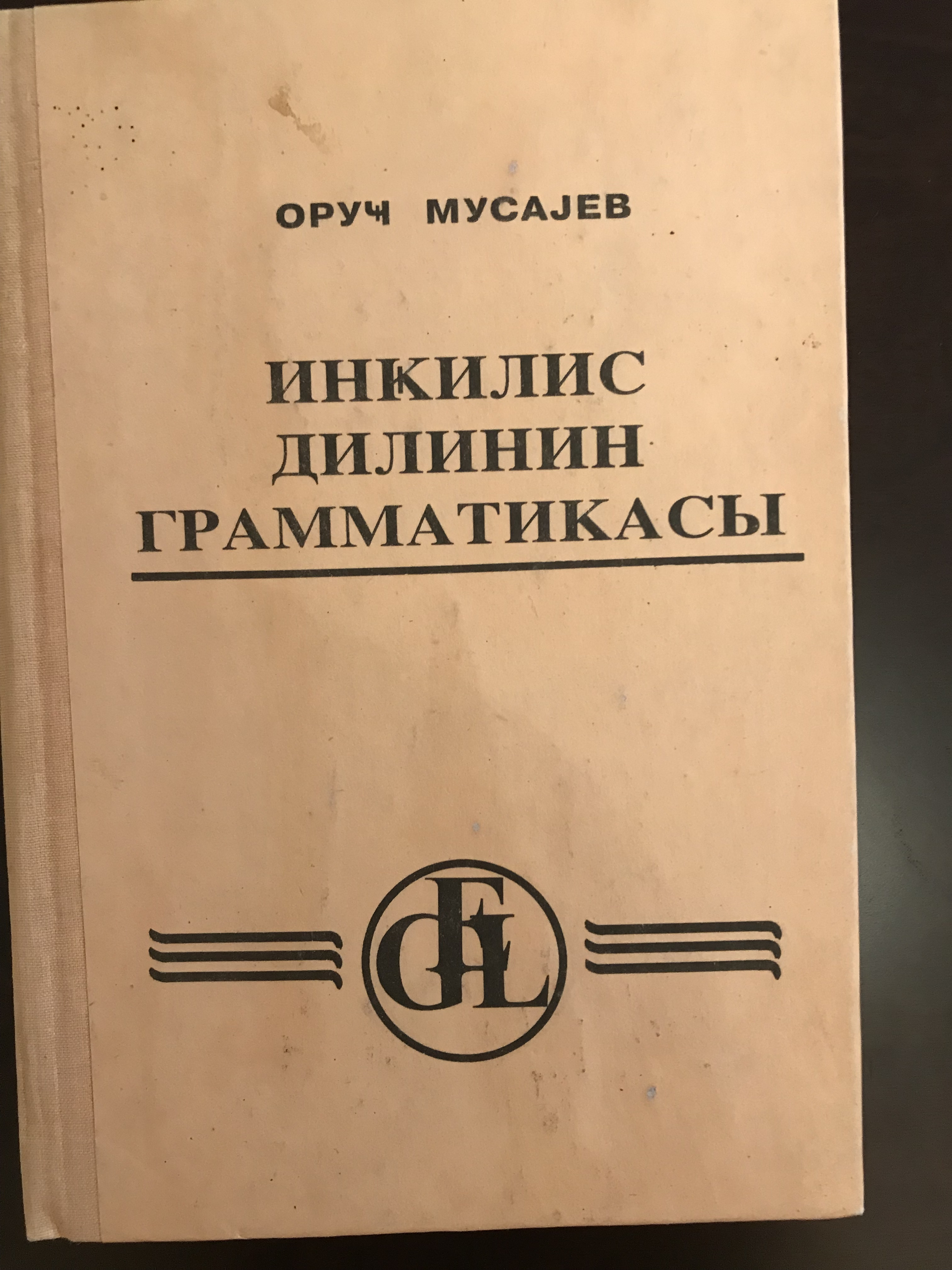 İngilis Dilinin Qrammatikası. Bakı - 1996